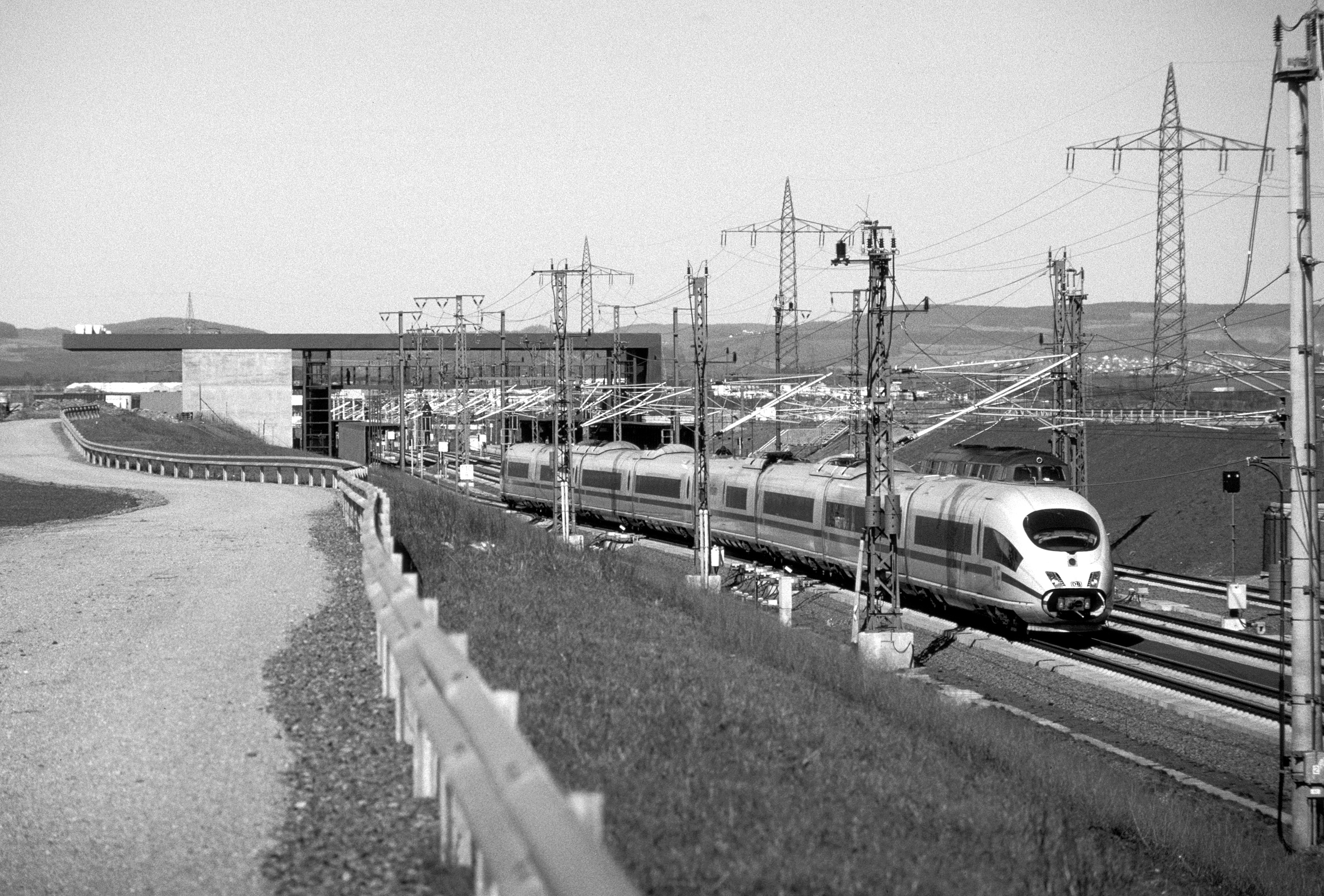 Bahnhof Limburg Süd 2003 (knapp ein Jahr nach seiner Eröffnung)